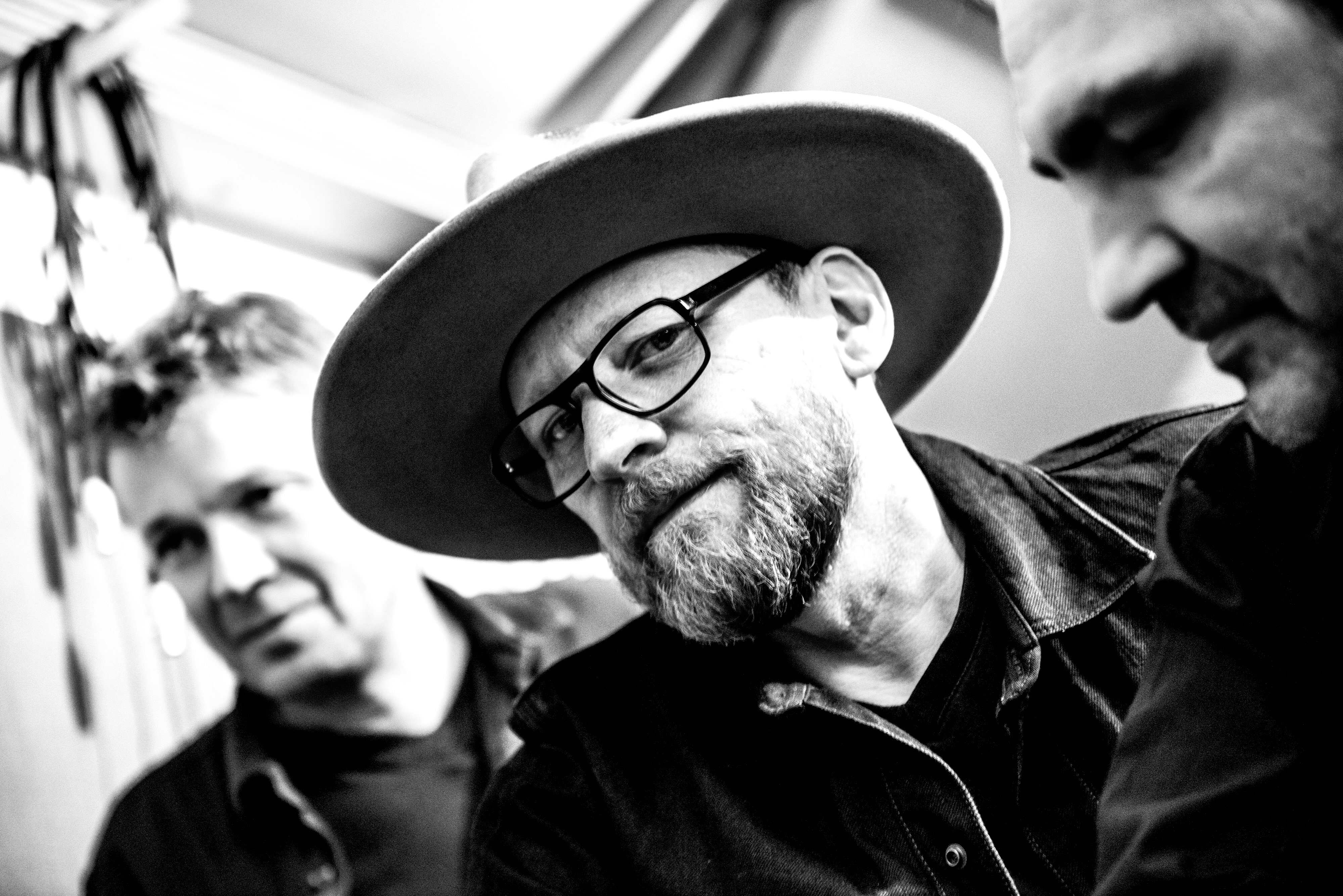 Alex Behning im Raum 01 Studio in Hamburg zu den Aufnahmen zum Album "Streunen ohne Schnur"